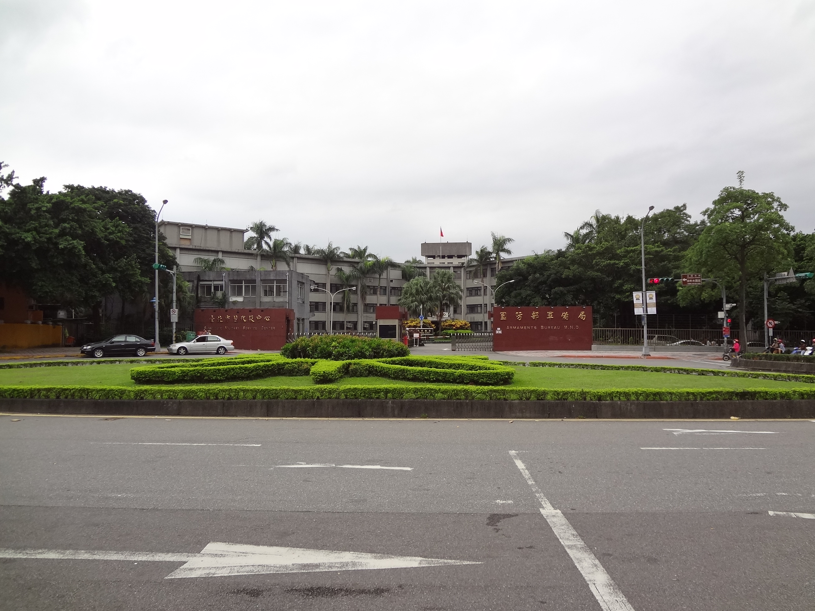 中華民國國防部軍備局與臺北市替代役中心，位於臺北市中正區汀州路三段8號。